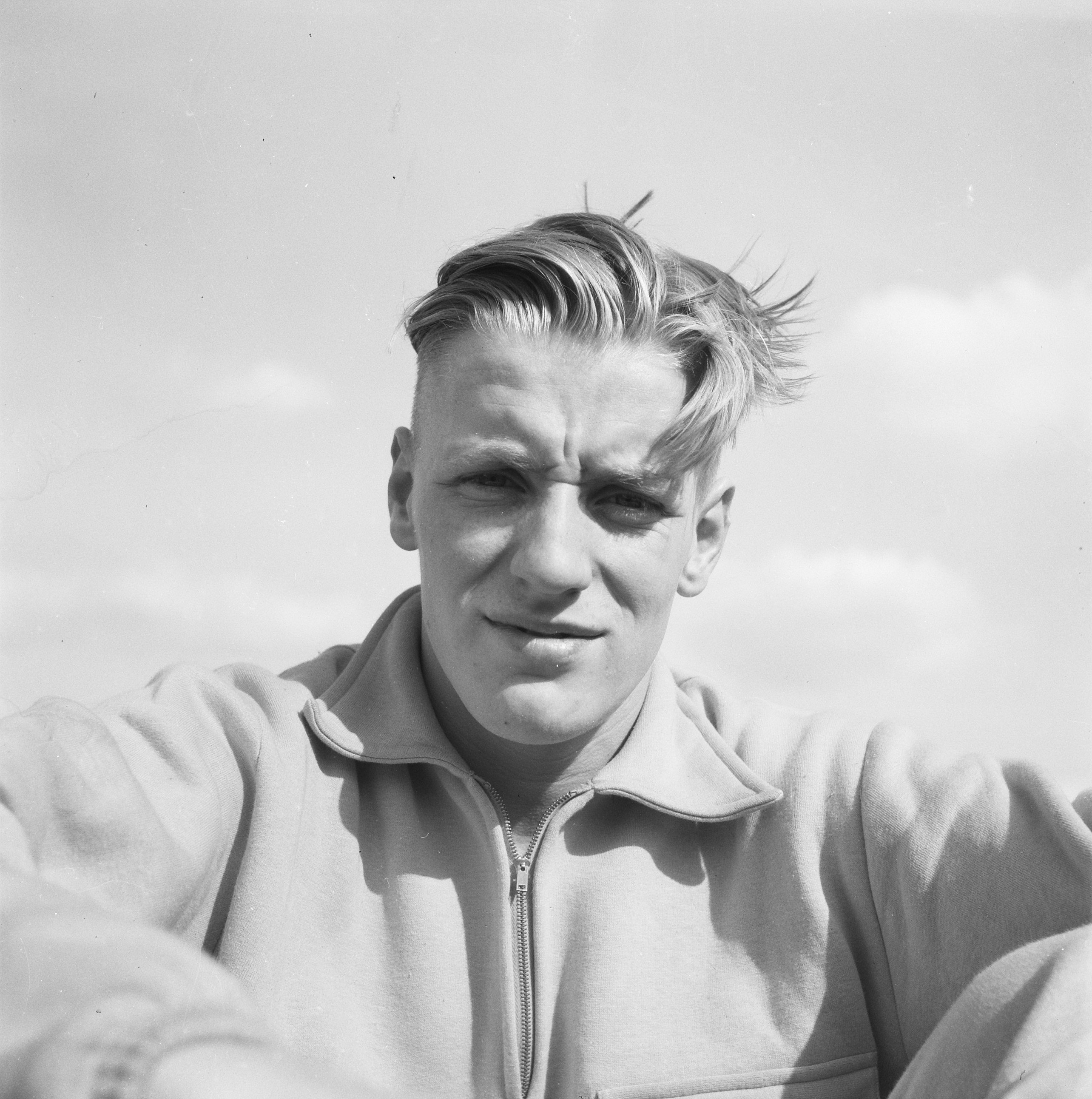 Collectie / Archief : Fotocollectie Anefo Reportage / Serie : [ onbekend ] Beschrijving : Atletiek Nederland tegen Noorwegen te Hengelo. De Friese sprinter Jan Lammers Datum : 20 augustus 1950 Locatie : Hengelo, Overijssel Trefwoorden : atleten, atletiek, portretten Persoonsnaam : Lammers, Jan Fotograaf : Noske, J.D. / Anefo Auteursrechthebbende : Nationaal Archief Materiaalsoort : Negatief (zwart/wit) Nummer archiefinventaris : bekijk toegang 2.24.01.03 Bestanddeelnummer : 934-5322